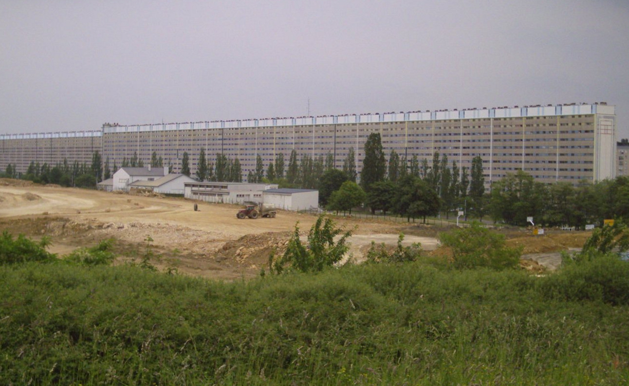 Cité du Haut du Liève à Nancy (3000 logements - Bernard Zehrfuss architecte)